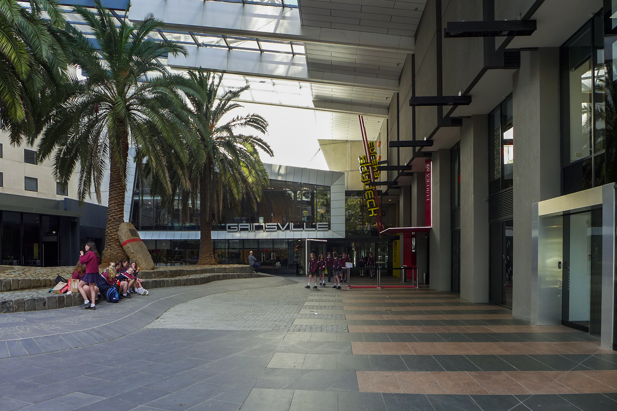 Eureka Tower GF Plaza